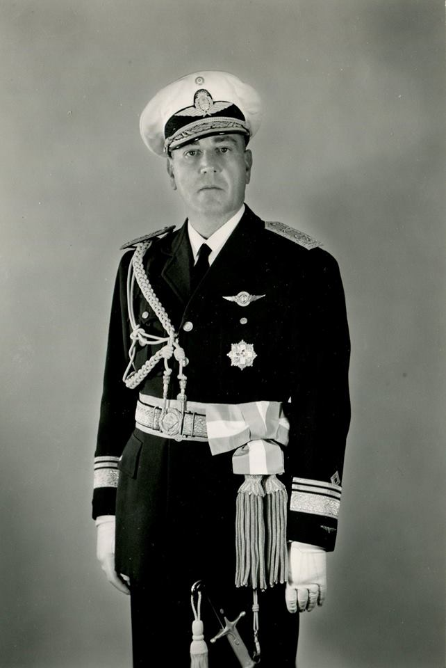 El Brigadier General Gustavo Hermansson.